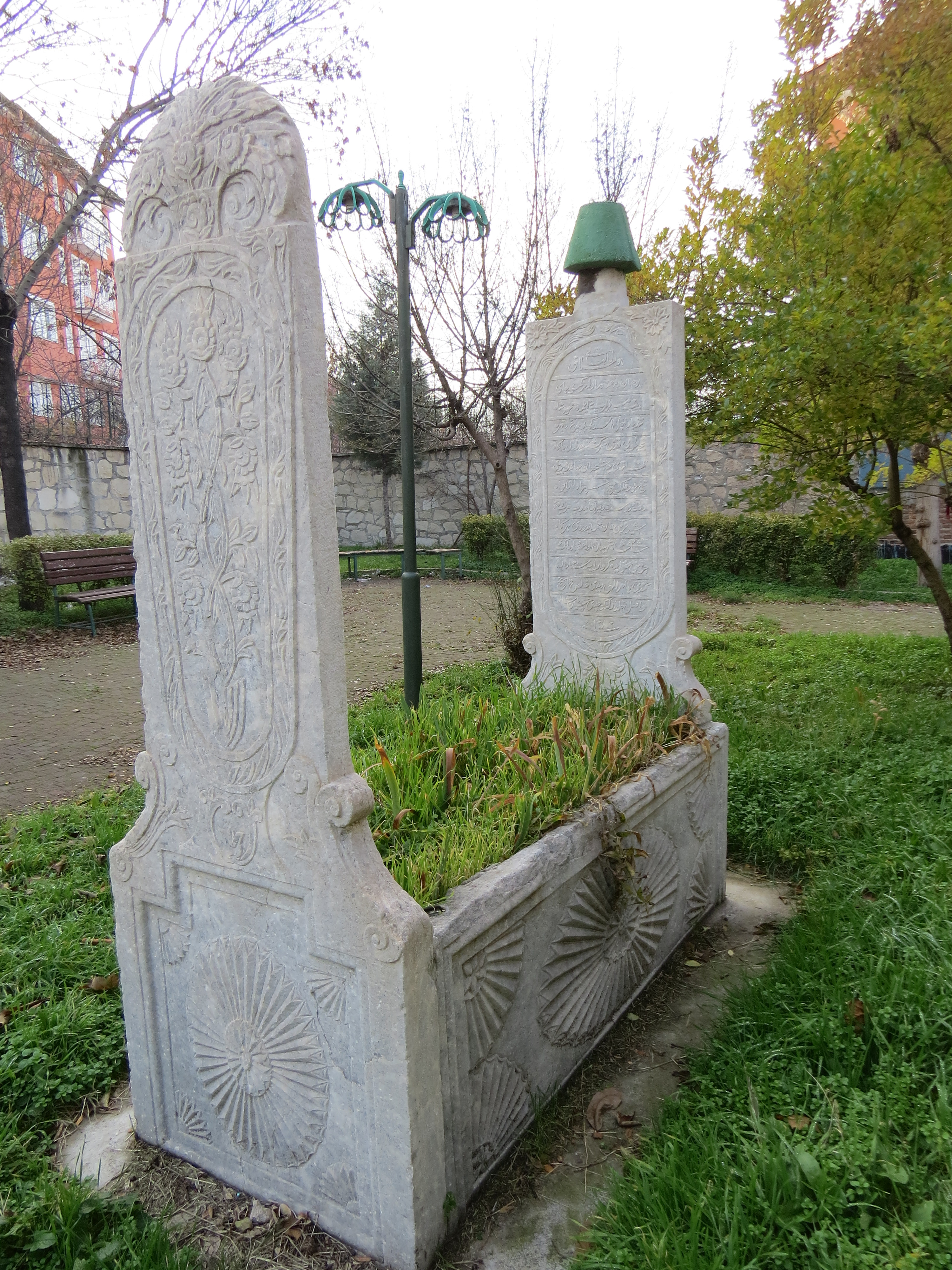 kütahyalı gazi hüseyin paşanın kabri